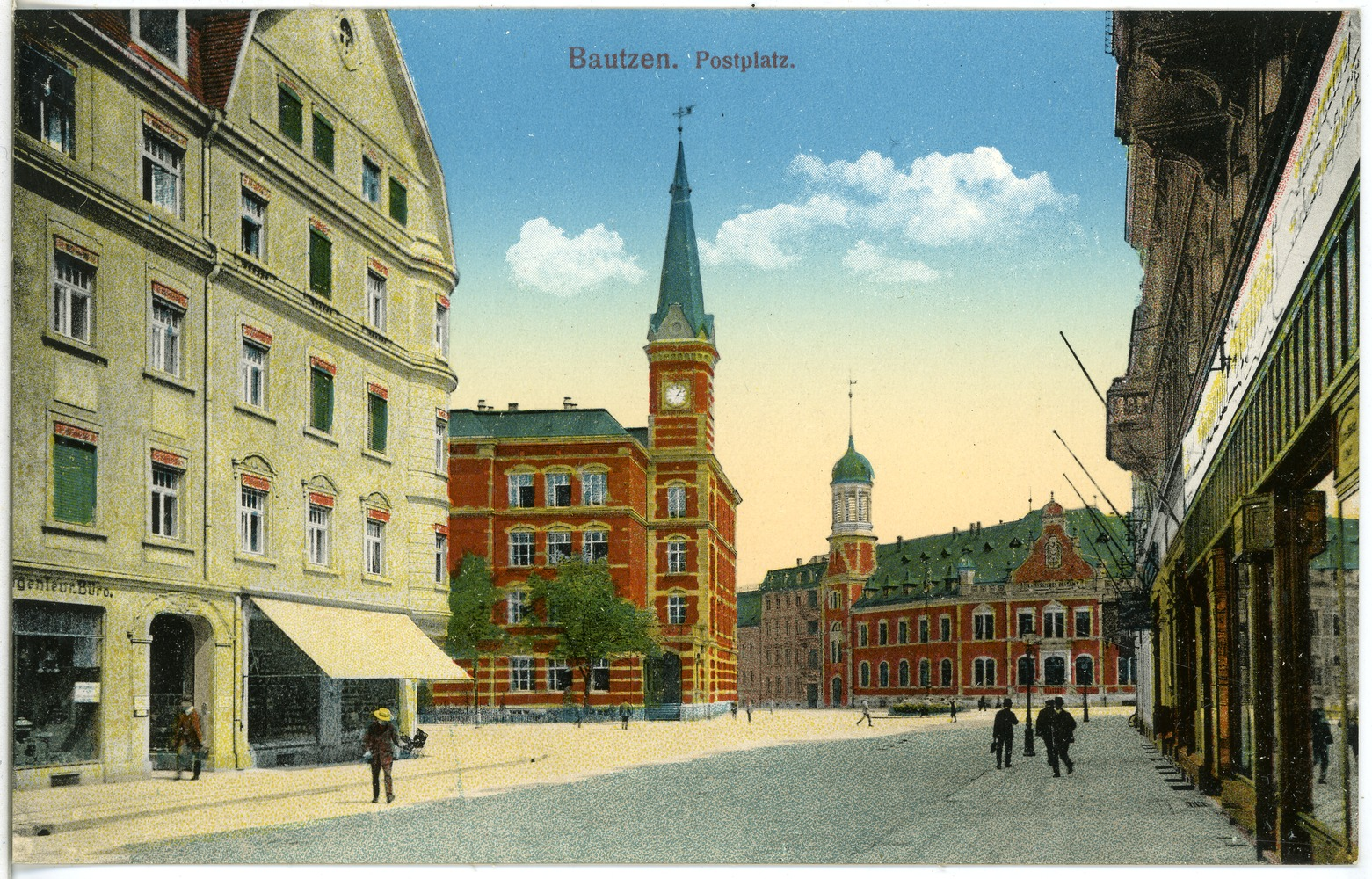 Bautzen; Postplatz This postcard is from publisher Brück & Sohn in Meißen ( This postcard has a unique number 18442 and is available in a higher resolution at the publisher. This images was uploaded in a cooperation project between Wikipedians and the publisher.